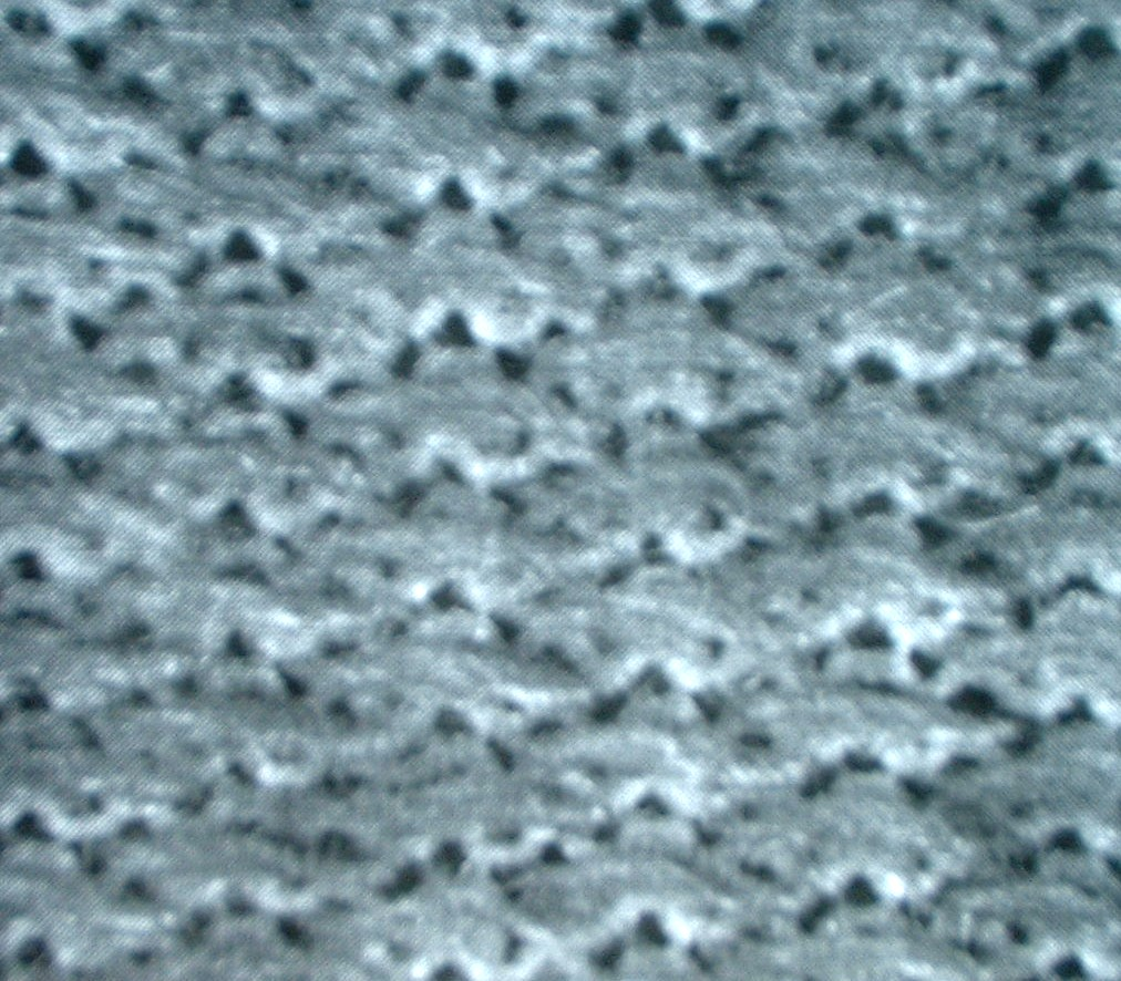 Futterbindung im RL-Gestrick